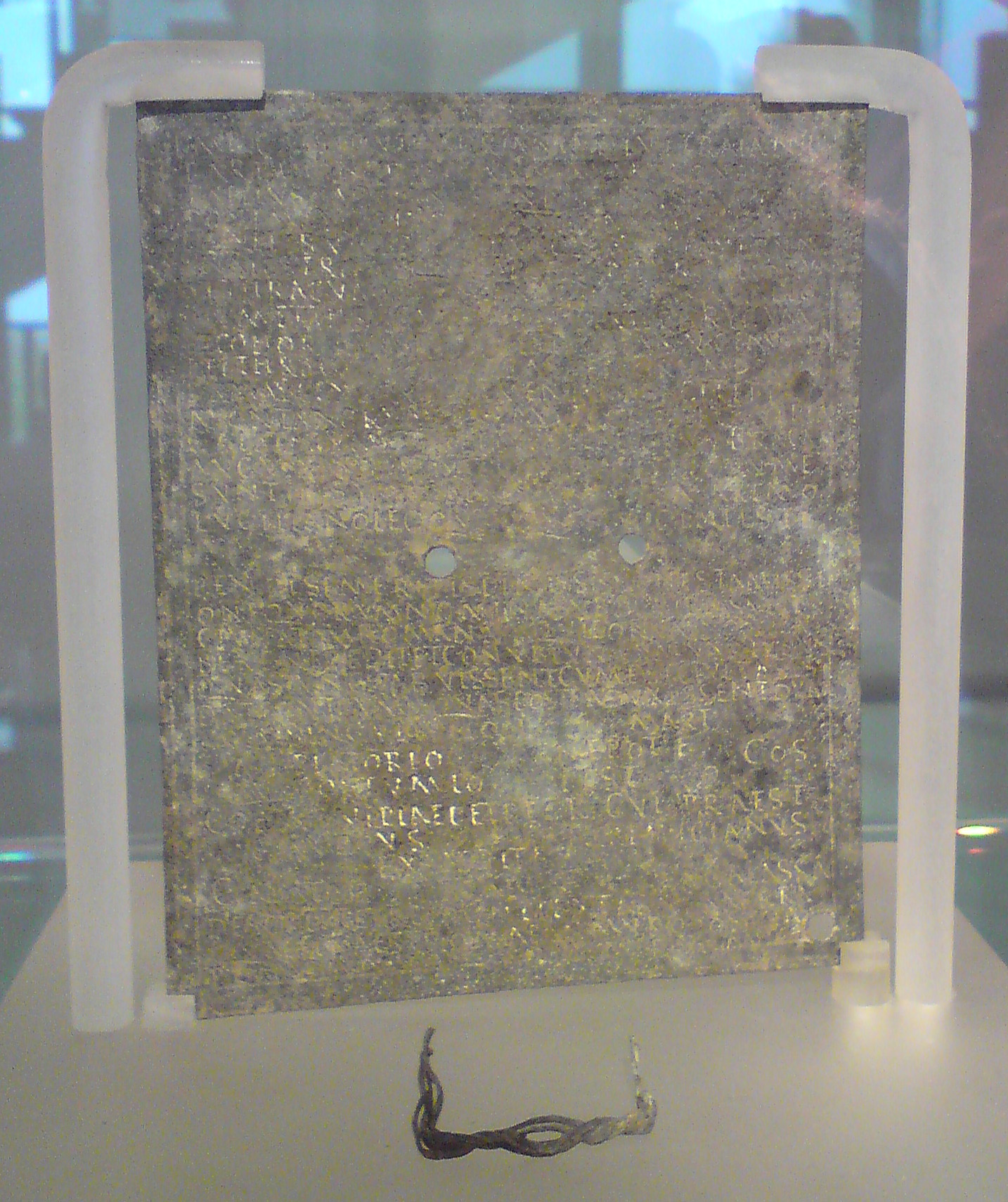 דיפלומה צבאית רומית משנת 160 לספירה מהפרובינקיה סוריה-פלסטינה, הדיפלומה שייכת לחייל ביחידות העזר שהתגייס 25 שנה לפני כן, בשנת 135 לספירה, בסוף מרד בר כוכבא. הדיפלומה הזו ועוד 3 דיפלומות נוספות משנת 160, מצביעות על אבידות כבדות לצבא הרומאי בזמן מרד בר כוכבא. הדיפלומה עצמה נמצאת במוזיאון הכט, ותפורסם על ידי וורנר אק וחנה כותן